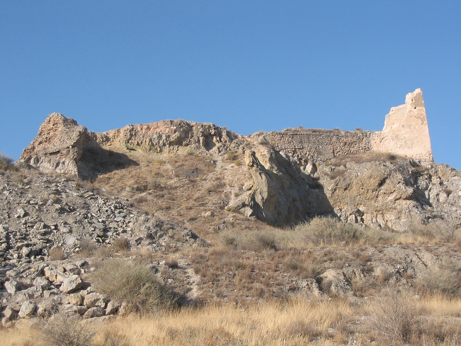 Fotografía del Castillo de Monóvar, Alicante, España.